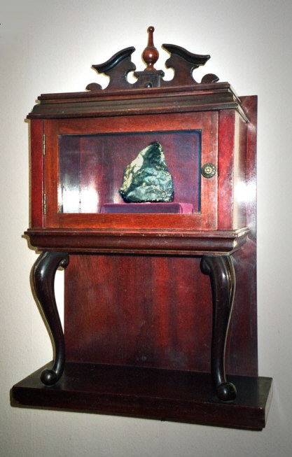 Meteoritenexemplar NWA3009 im Sammlungsschrein des Besitzers